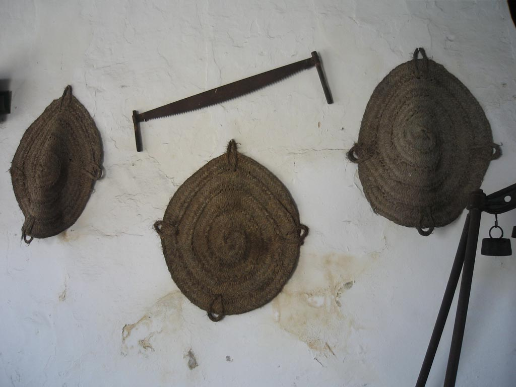 Redores colgados en un bodega de Bardadillo S.A. en Sanlúcar de Barrameda